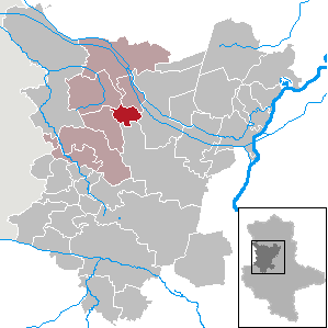 Süplingen in Saxony-Anhalt (Country) - District (Landkreis) Börde